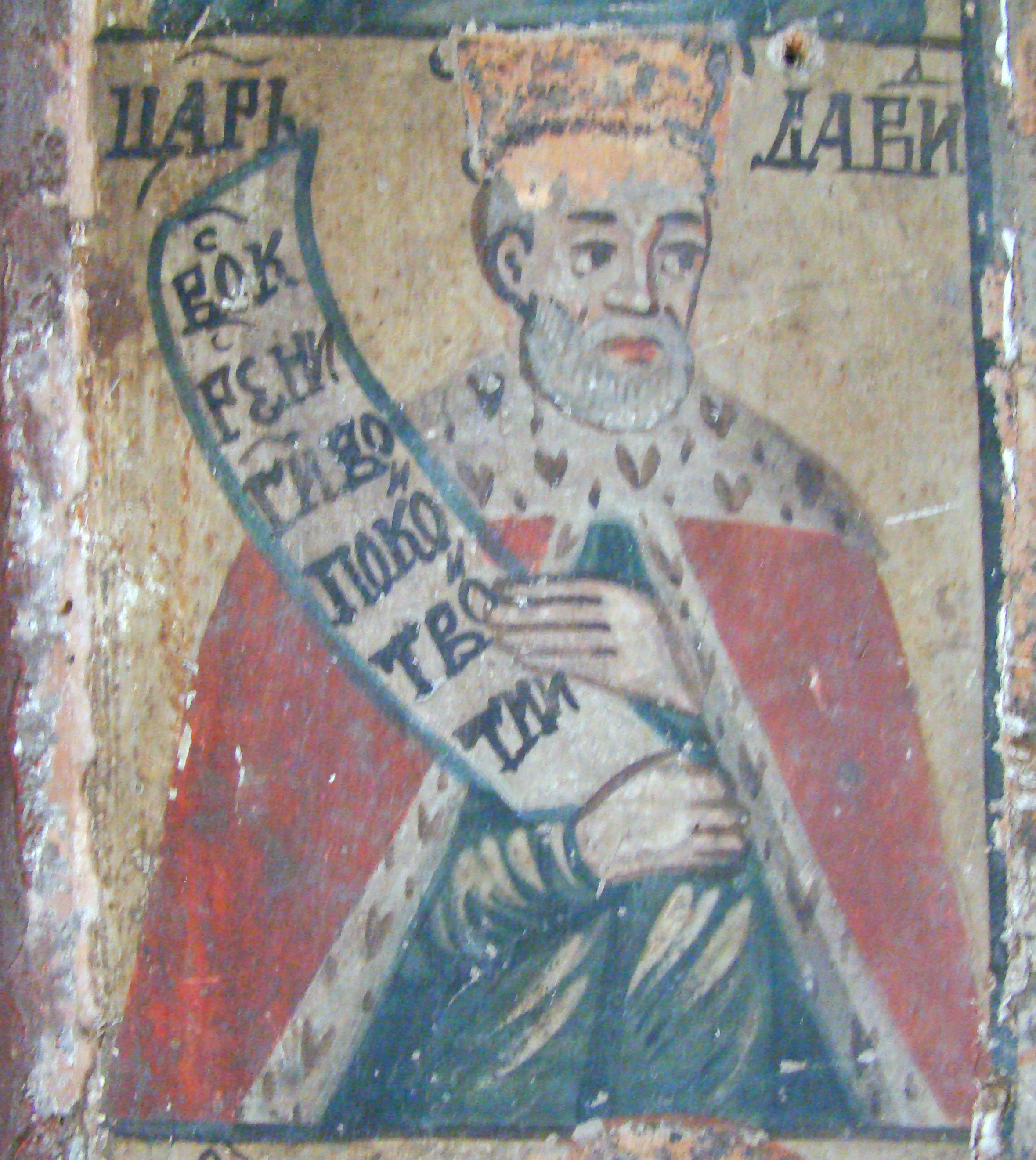 Biserica de lemn „Sf.Arhangheli” din Boiereni, județul Maramureș